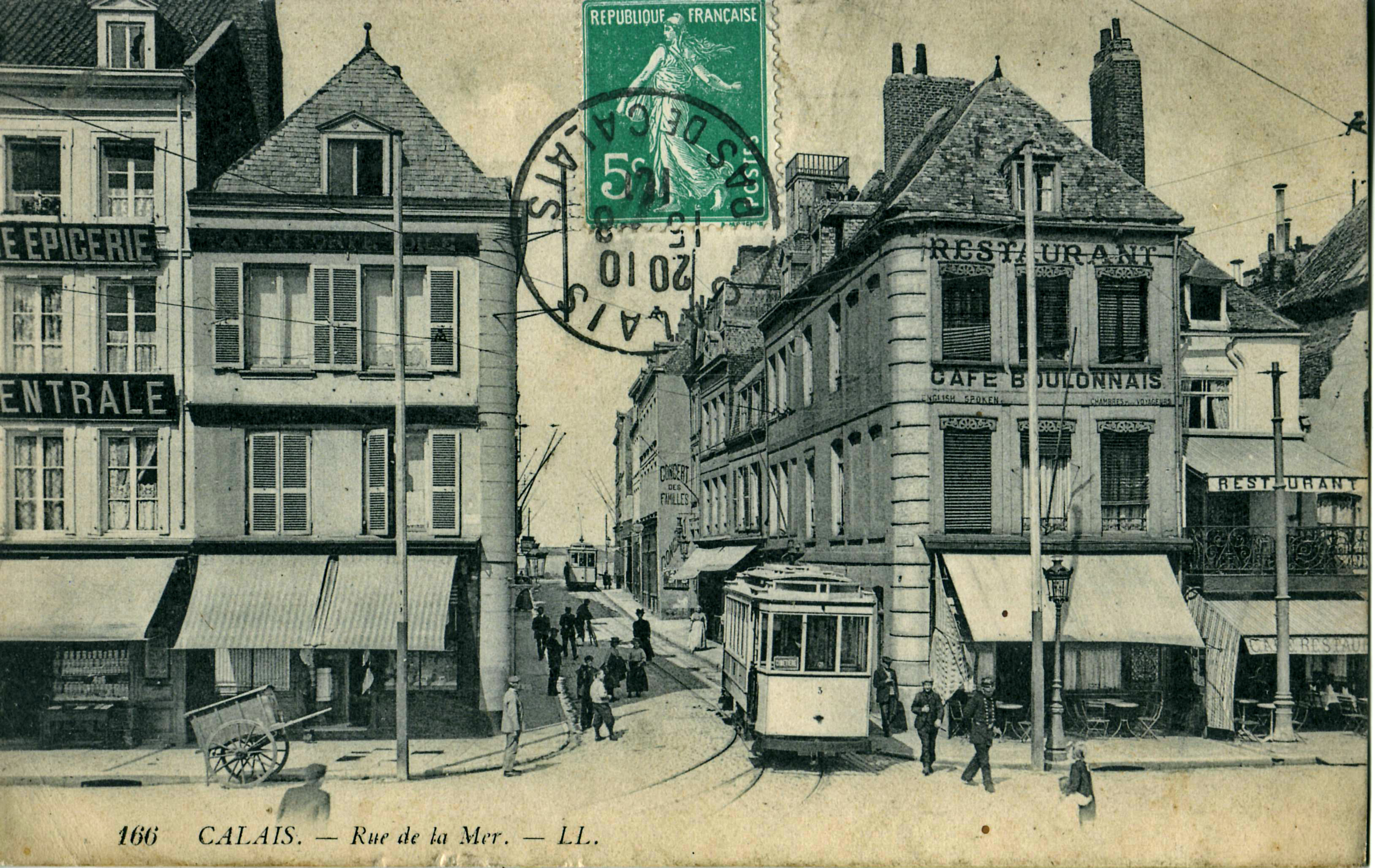 Carte postale ancienne éditée par LL n°166 :CALAIS - Rue de la Mer